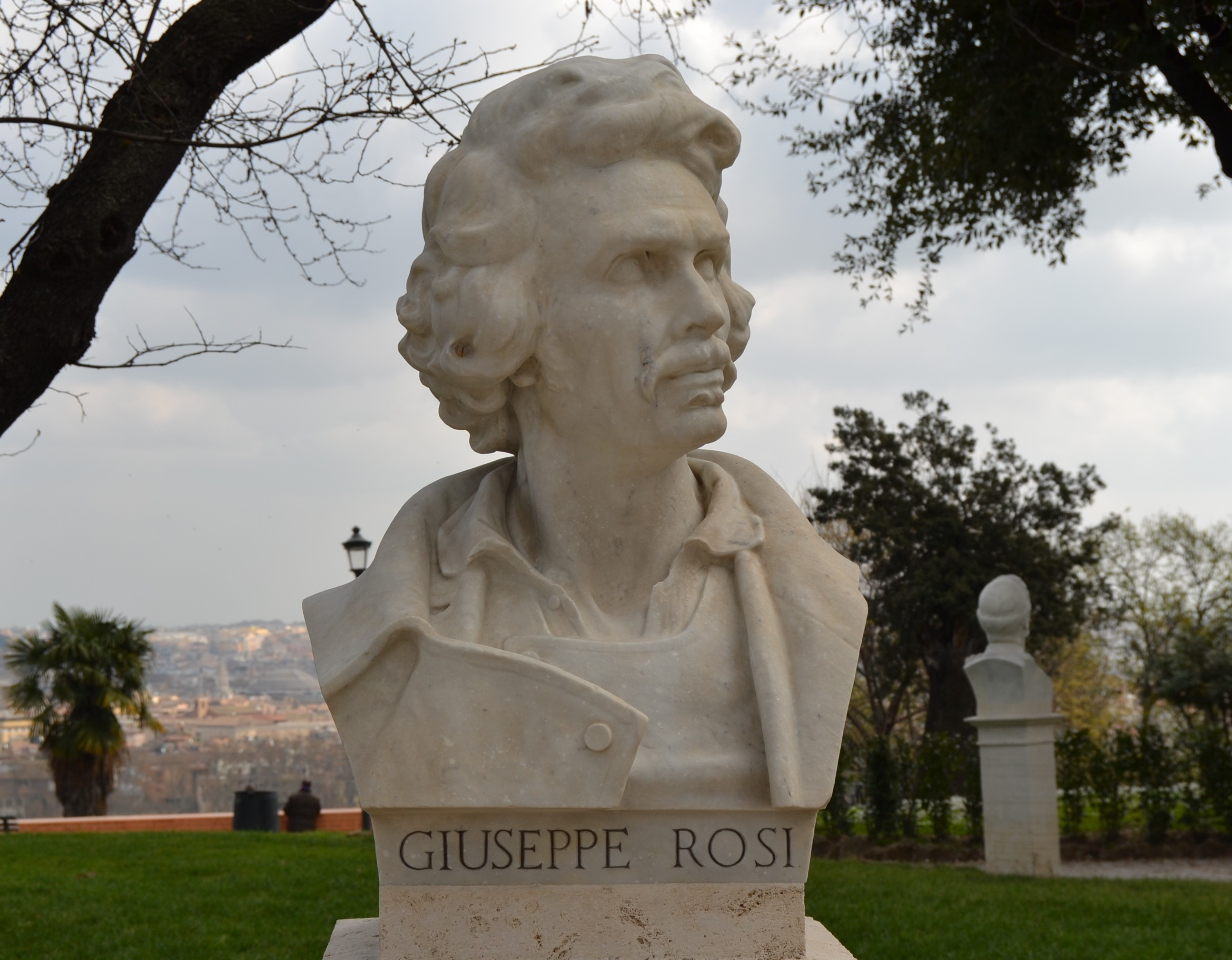 Busto restaurato di Giuseppe Rosi